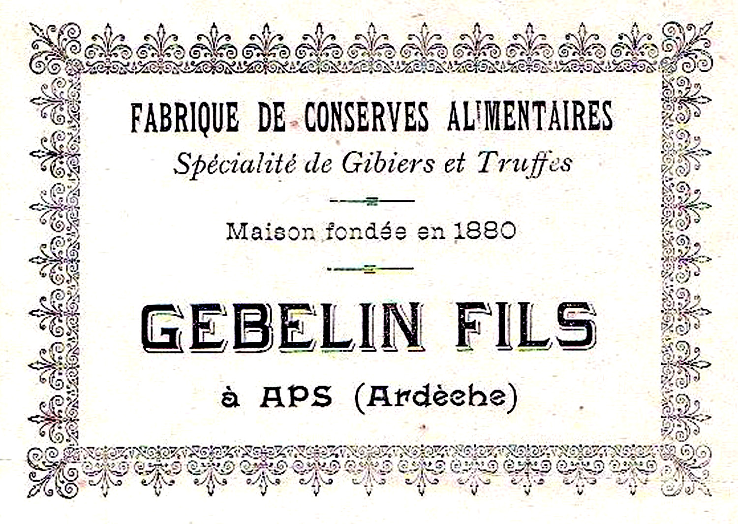 Gibelin Trufficulteur